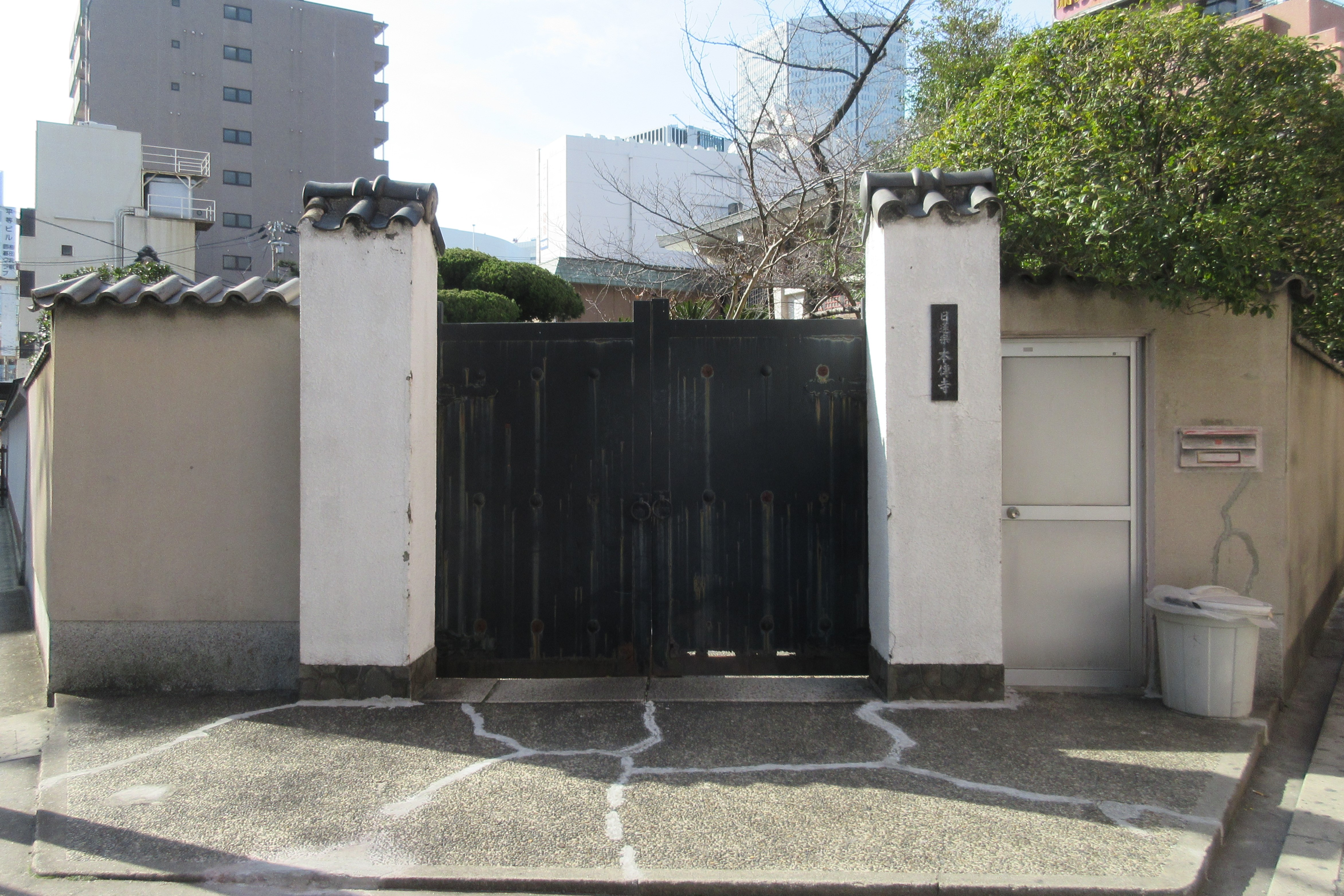 大阪市の本傳寺の門